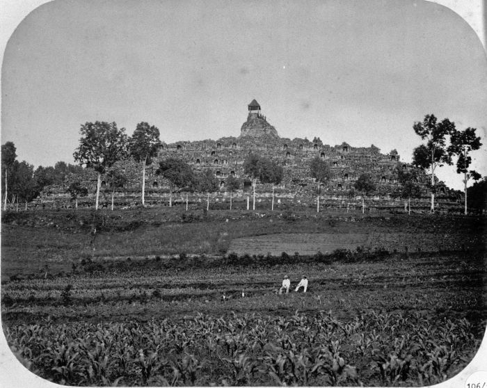 Foto. Borobudur